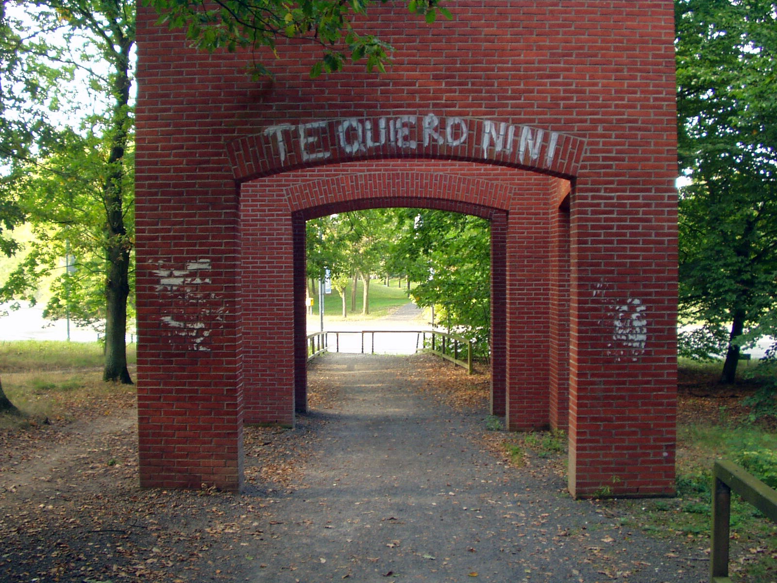 sculpture Backsteinskulptur Gießen by Per Kirkeby at Uni Giessen/Germany